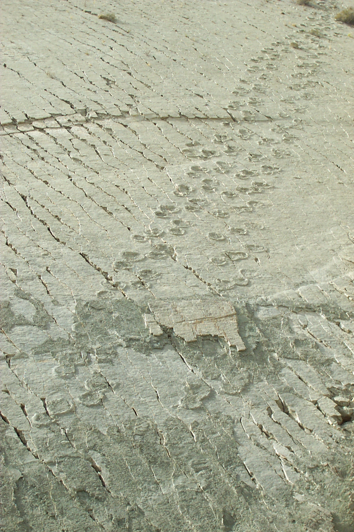 Eigen foto. Moeder en kind.Sporen van Titanosaurus op een krijtwand te Sucre (Bolivia).Zomer 2002